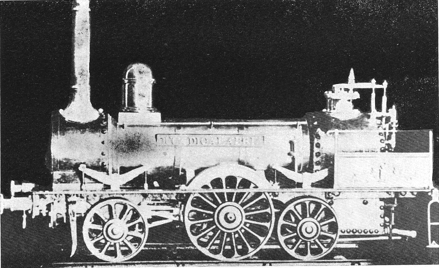 La locomotiva "Duca di Calabria", costruita nel 1846 su progetto del sig. Coppola dalle Officine delle stazioni di Napoli. Fu la prima locomotiva progettata e costruita in Italia.